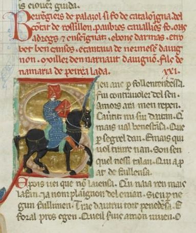 Portrait de Berenguer de Palou (issu de Chansonnier provençal, f. 140, 2ème moitié XIIIème siècle)